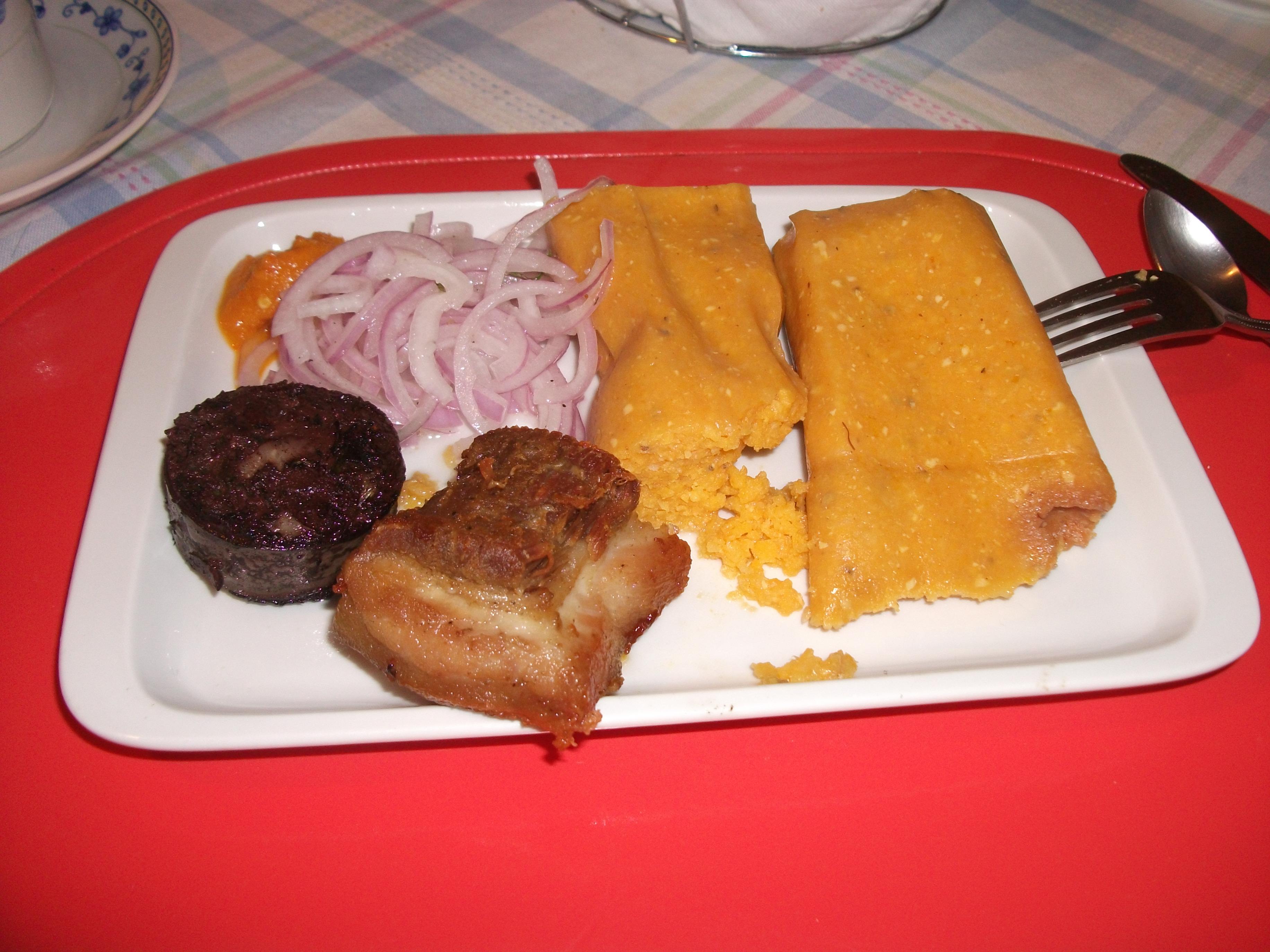 Tamales, relleno, chicharrón y zarza